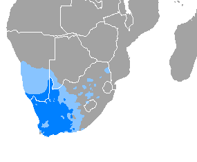 Idioma afrikáans